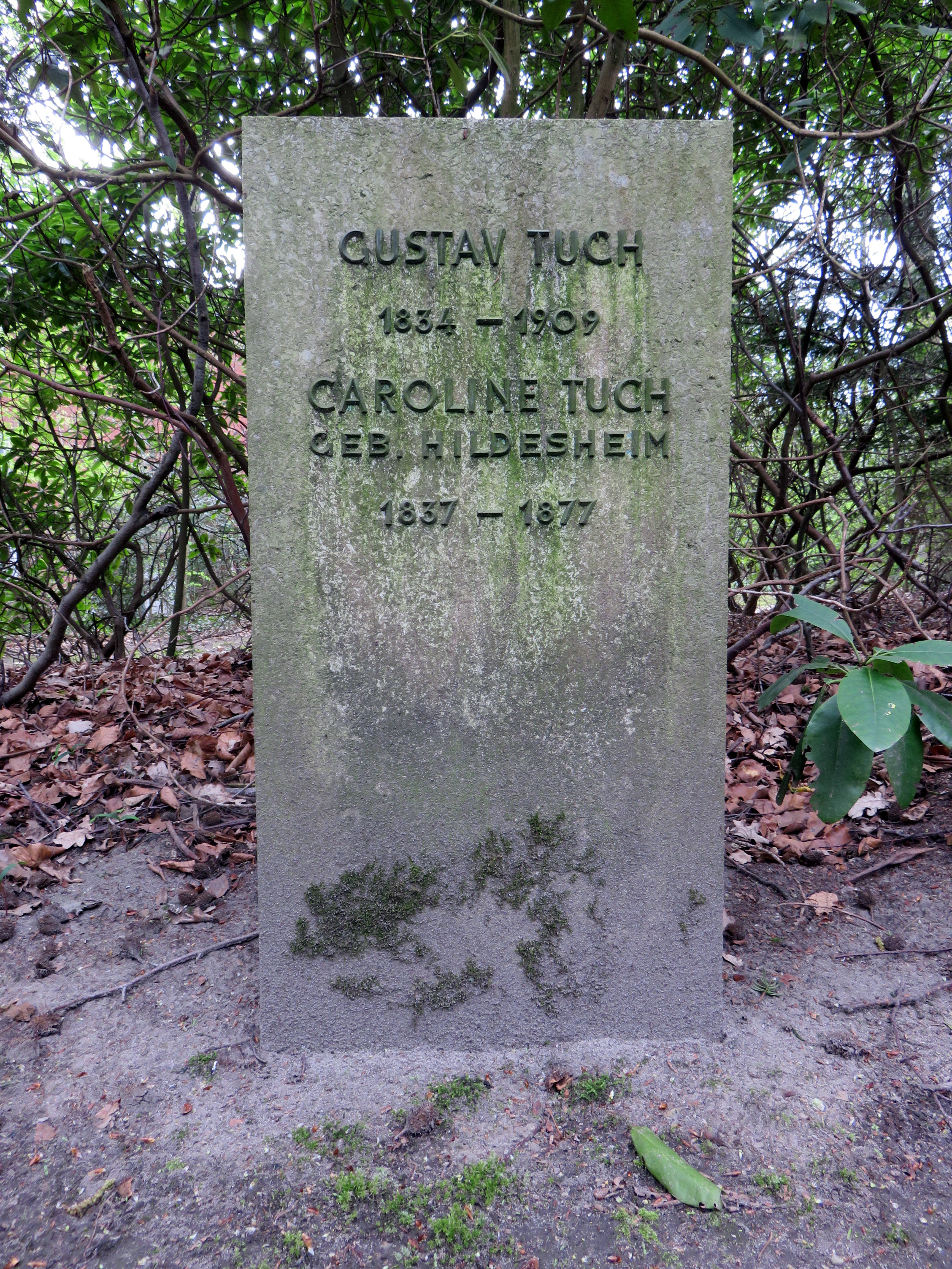 Gedenkstein für den deutschen Kaufmann Gustav Tuch in der Ehrenanlage im Bereich „Grindelfriedhof“ auf dem Jüdischen Friedhof Ohlsdorf.